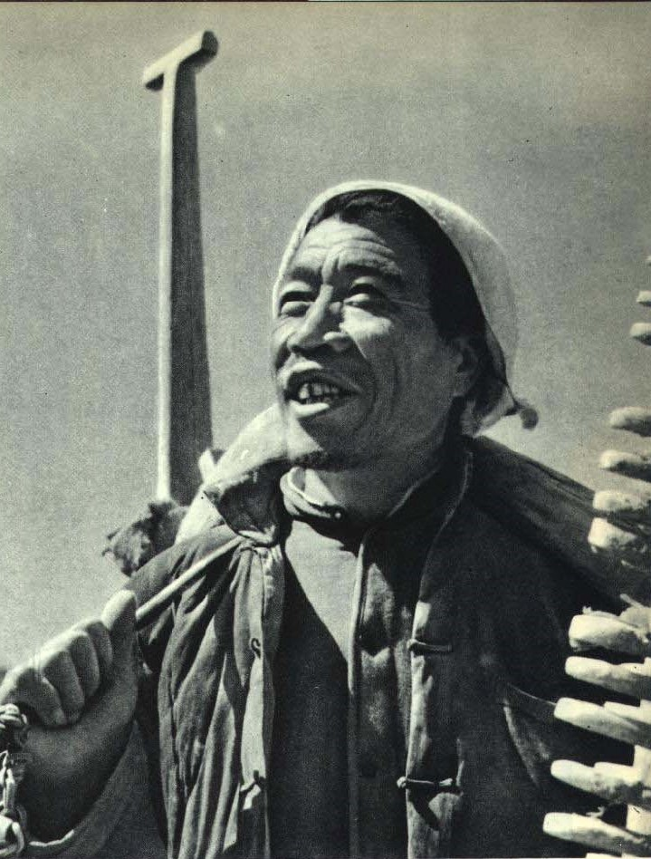 1963-11 1963 陈永贵